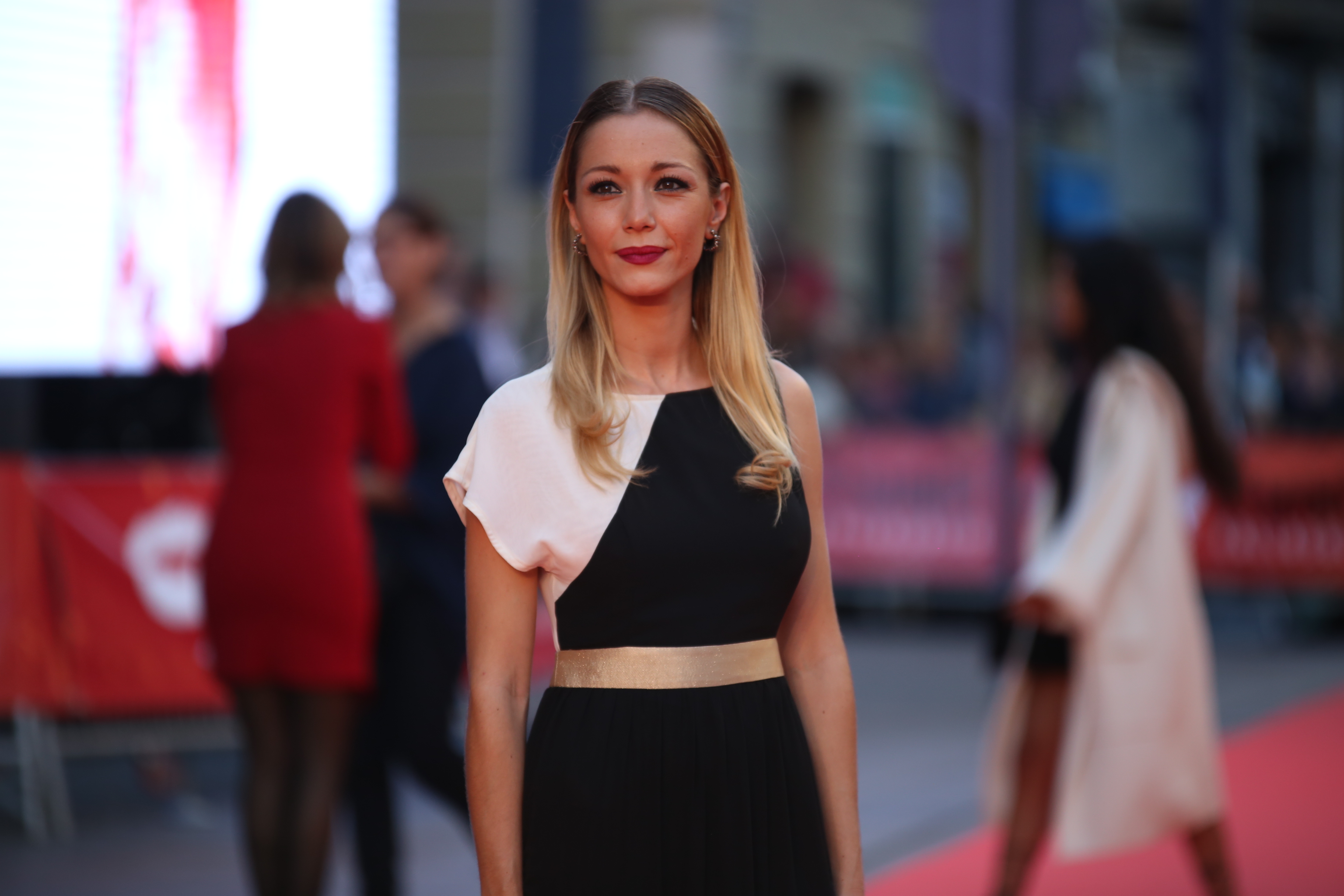 Seminci 2016